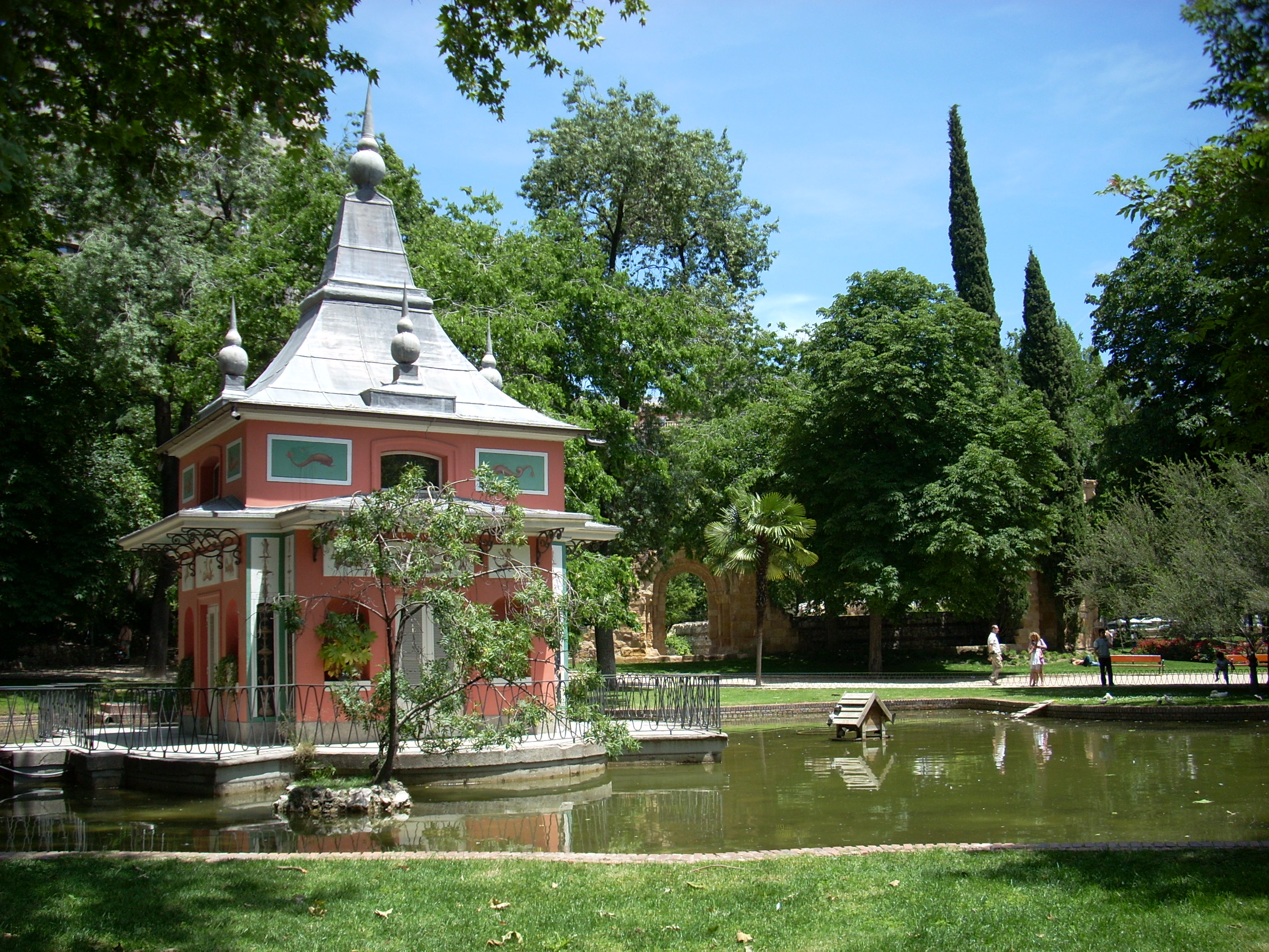 Casita del Pescador, Parco del Retiro, Madrid, Spagna